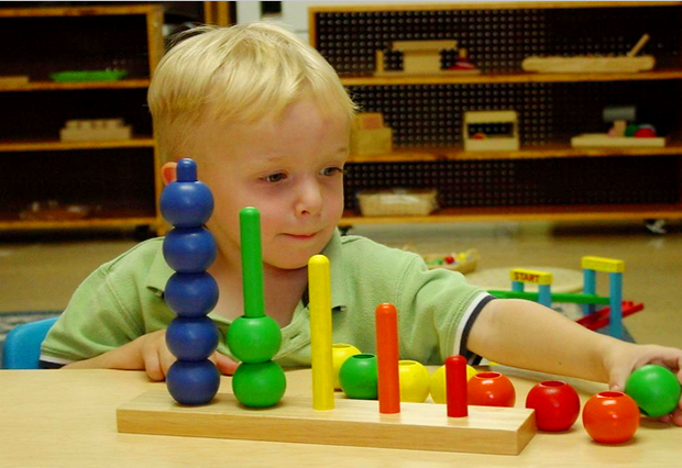 es uno de los métodos empleados por Montessori para que el niño aprenda jugando